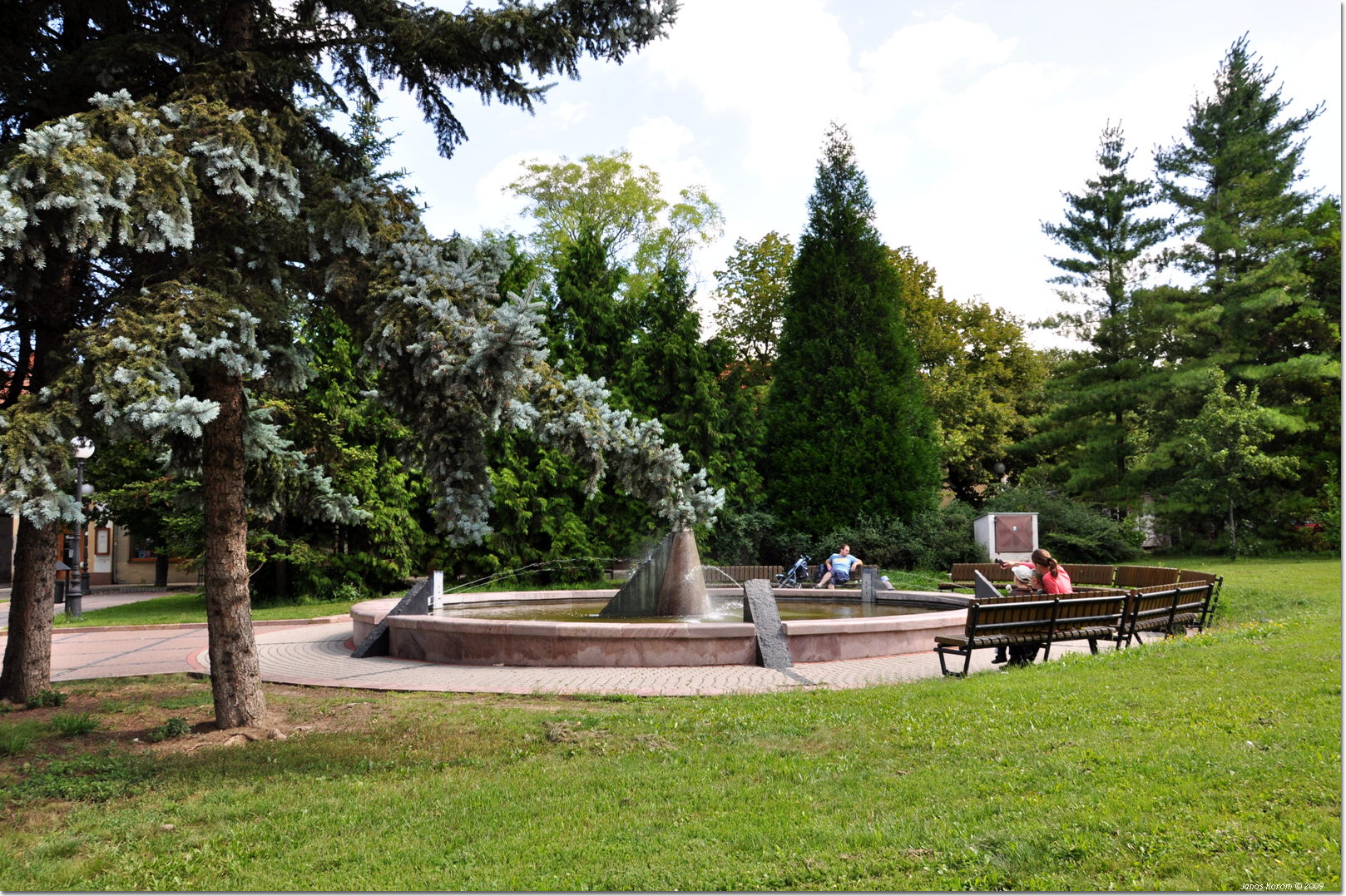 Fontána ve Zlatých Moravcích na Slovensku